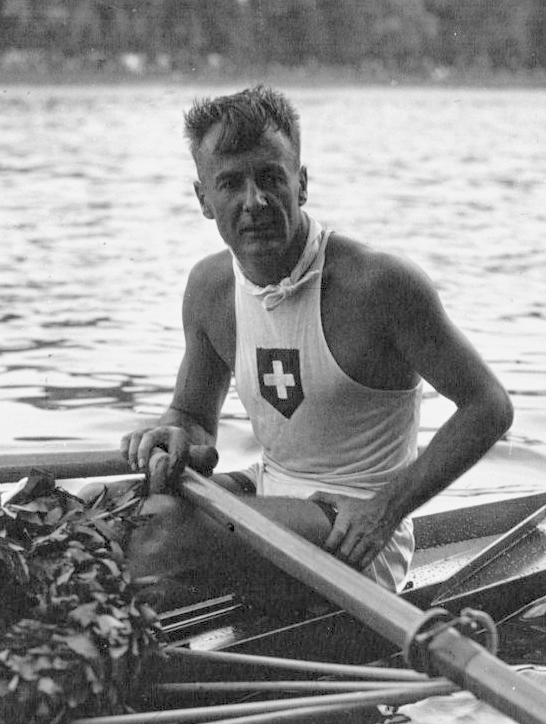 Suresnes: Championnats d'Europe d'avirons : Candeneau (Suisse) : [photographie de presse] / Agence Meurisse